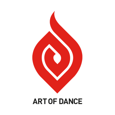 Art of Dance